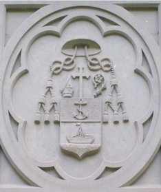 Wappen Georg Anton von Stahl 1805-1870, Bischof von Würzburg 1840-1870 Wappen an der Fassade der Bonifatius-Kapelle auf der Salzburg b.Bad Neustadt/Saale